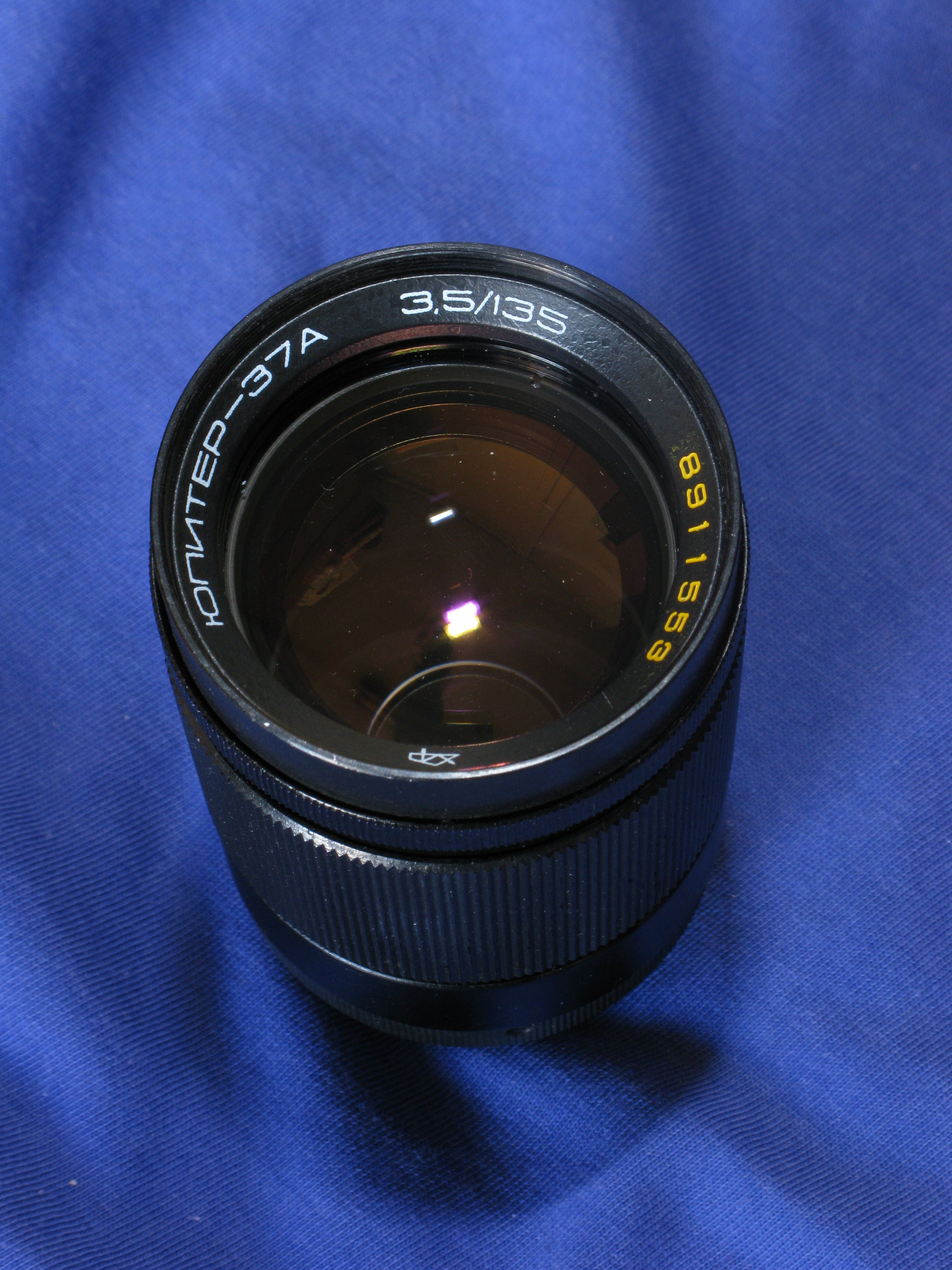 Objetivo Jupiter-37A 135mm 3.5 vista frontal